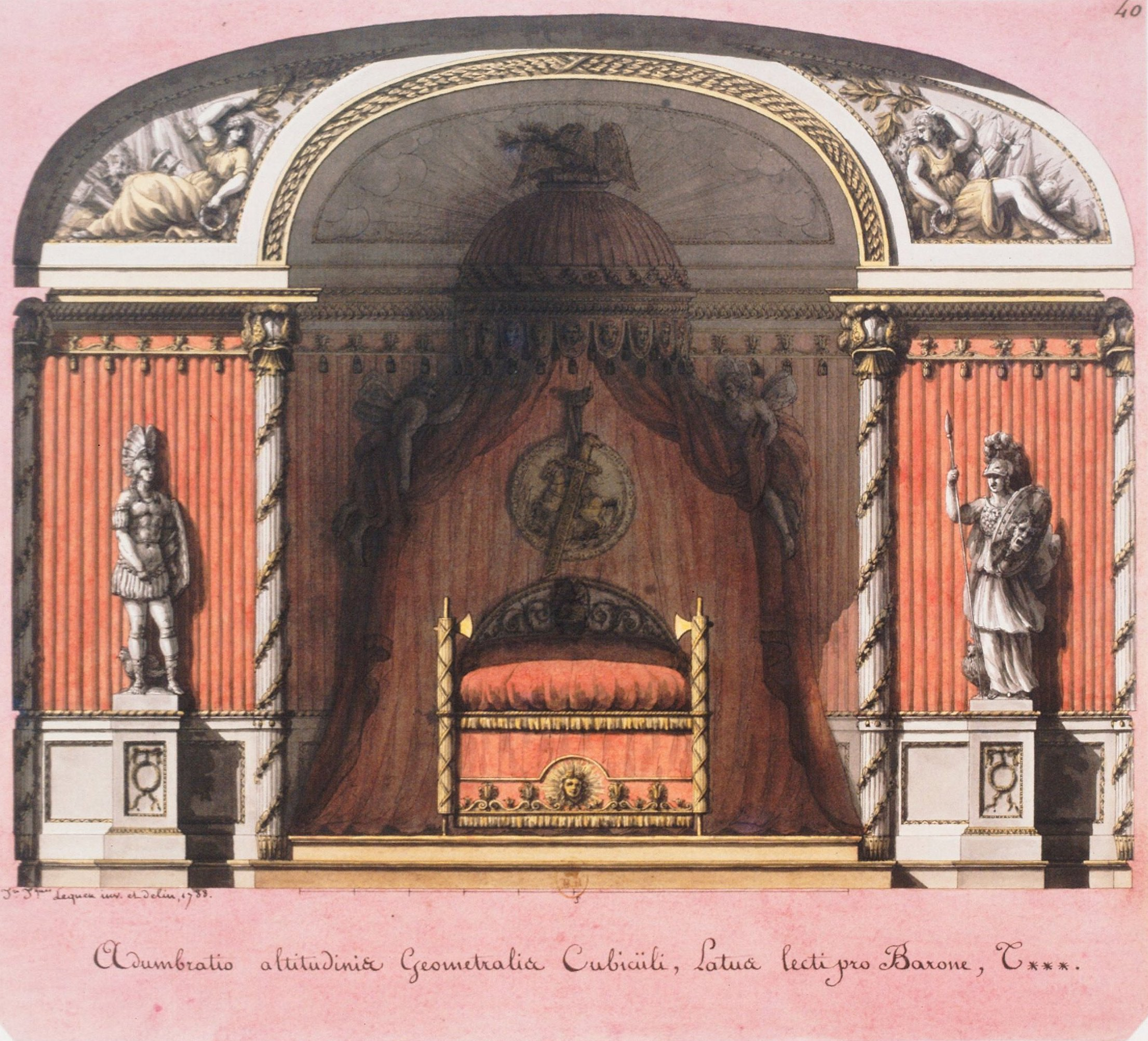 Adumbratio altitudinae geometralia ... ; Elévation de l'alcôve antique pour le baron T*** , [dessin] , Jean Jacques Lequeu, velin